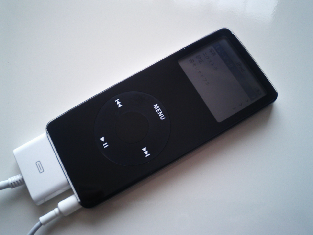 iPod nano 1st generation (4GB, black model)